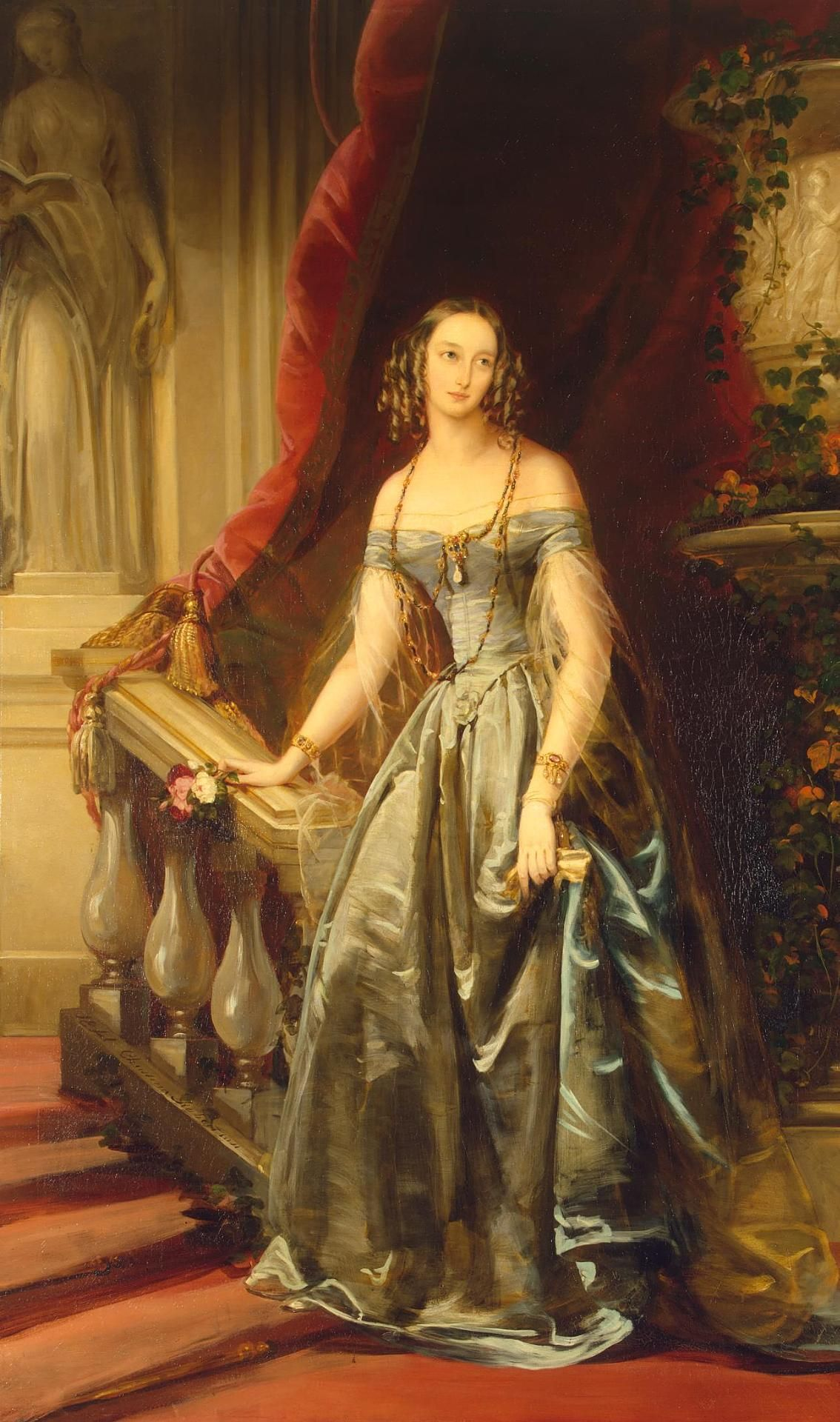 Olga Nikolaïevna, fille du Tsar Nicolas 1er